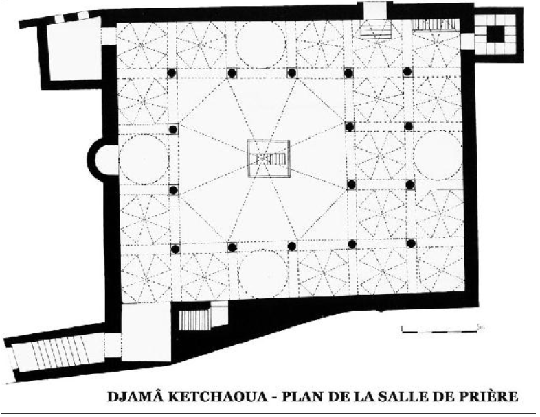 Plan de l'ancienne configuration de la mosquée Ketchaoua (époque de la régence d'Alger) selon les constatations de Ravoisier en 1842